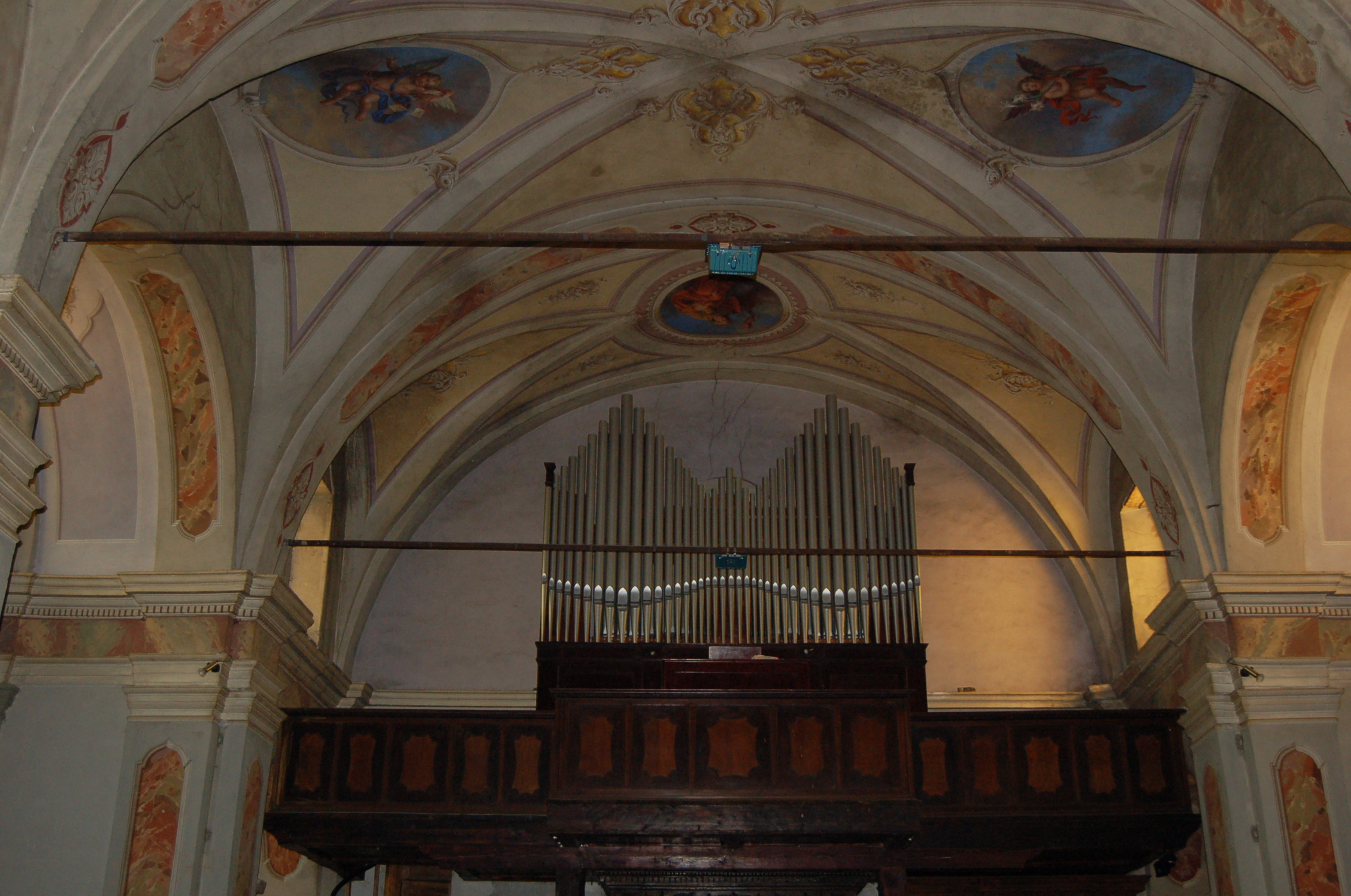 Baruffini Organo chiesa